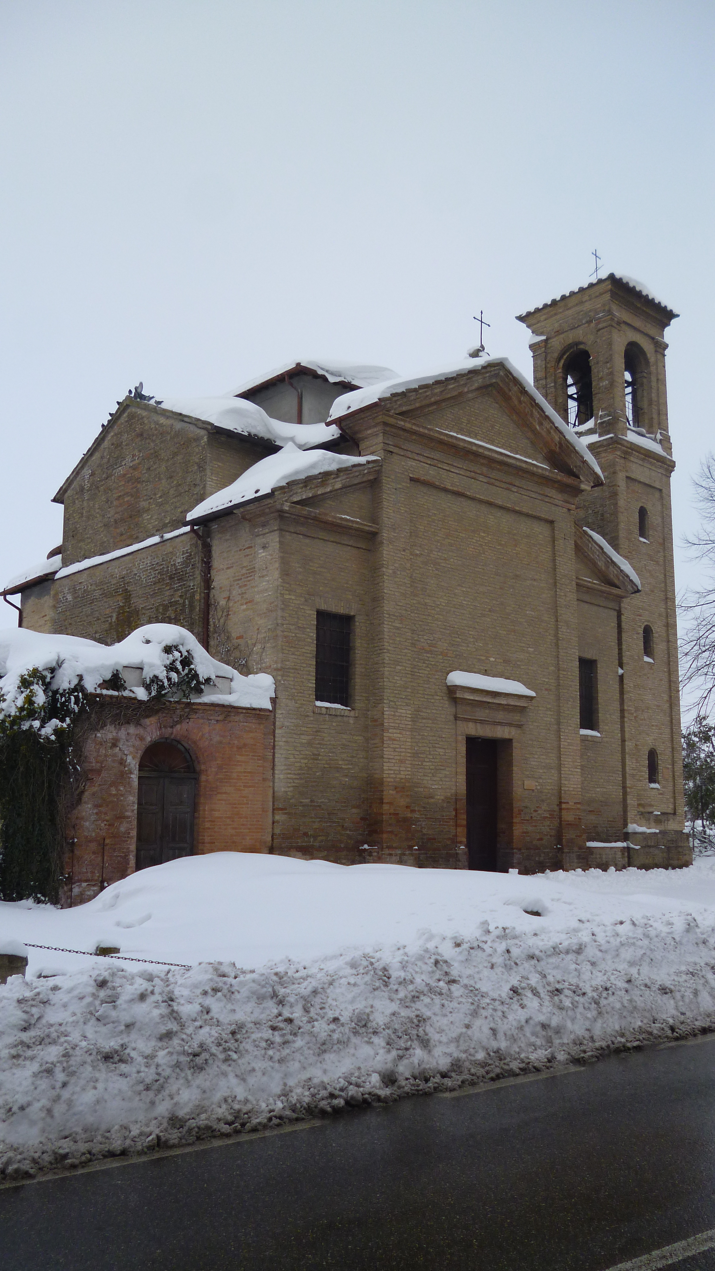 Autore: Marco Collinelli